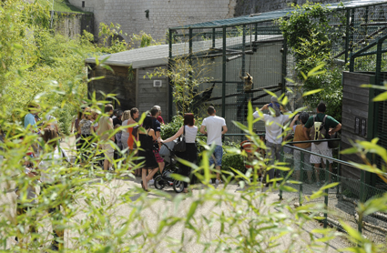 L'espace des lémuriens